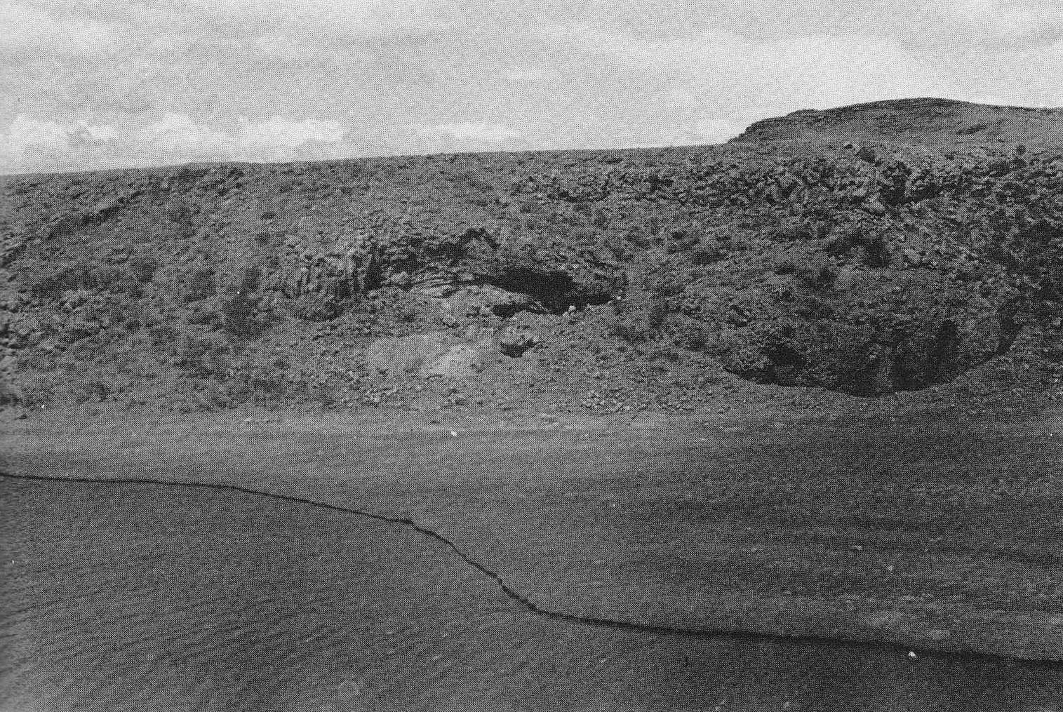 Entrada a al Cueva Fell vista desde la otra rilla del río Chico.